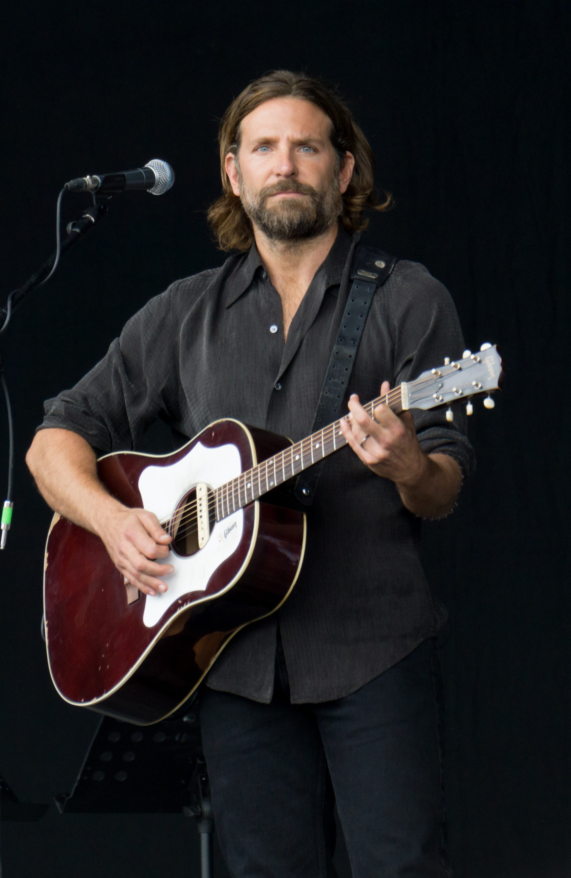 Glasto17-44